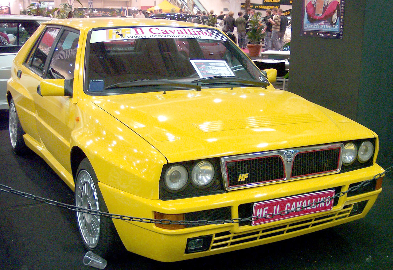 Lancia Delta HF Integrale 16v Evoluzione II Gialla, Essen Motor Show 2006.